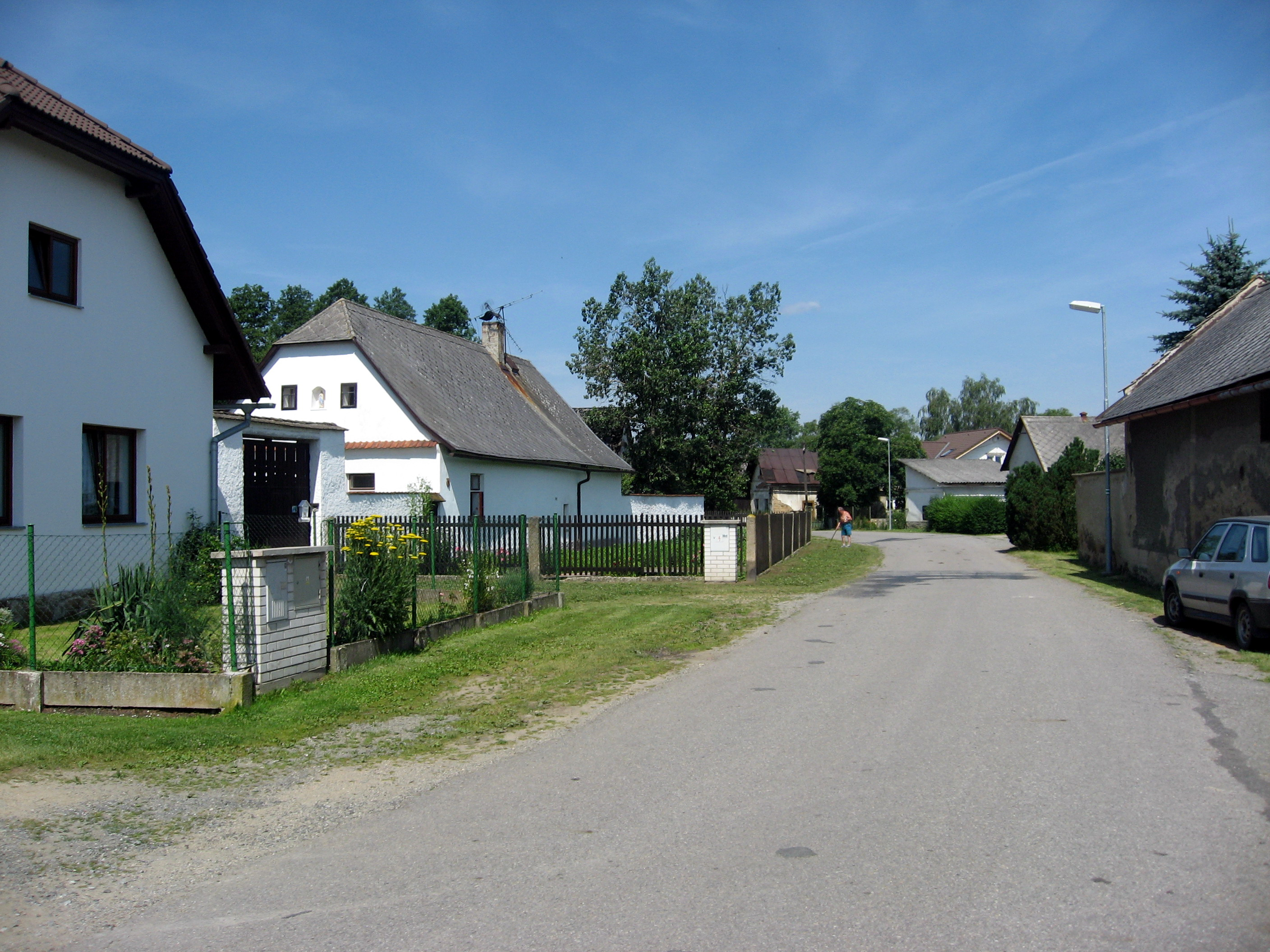 Babice